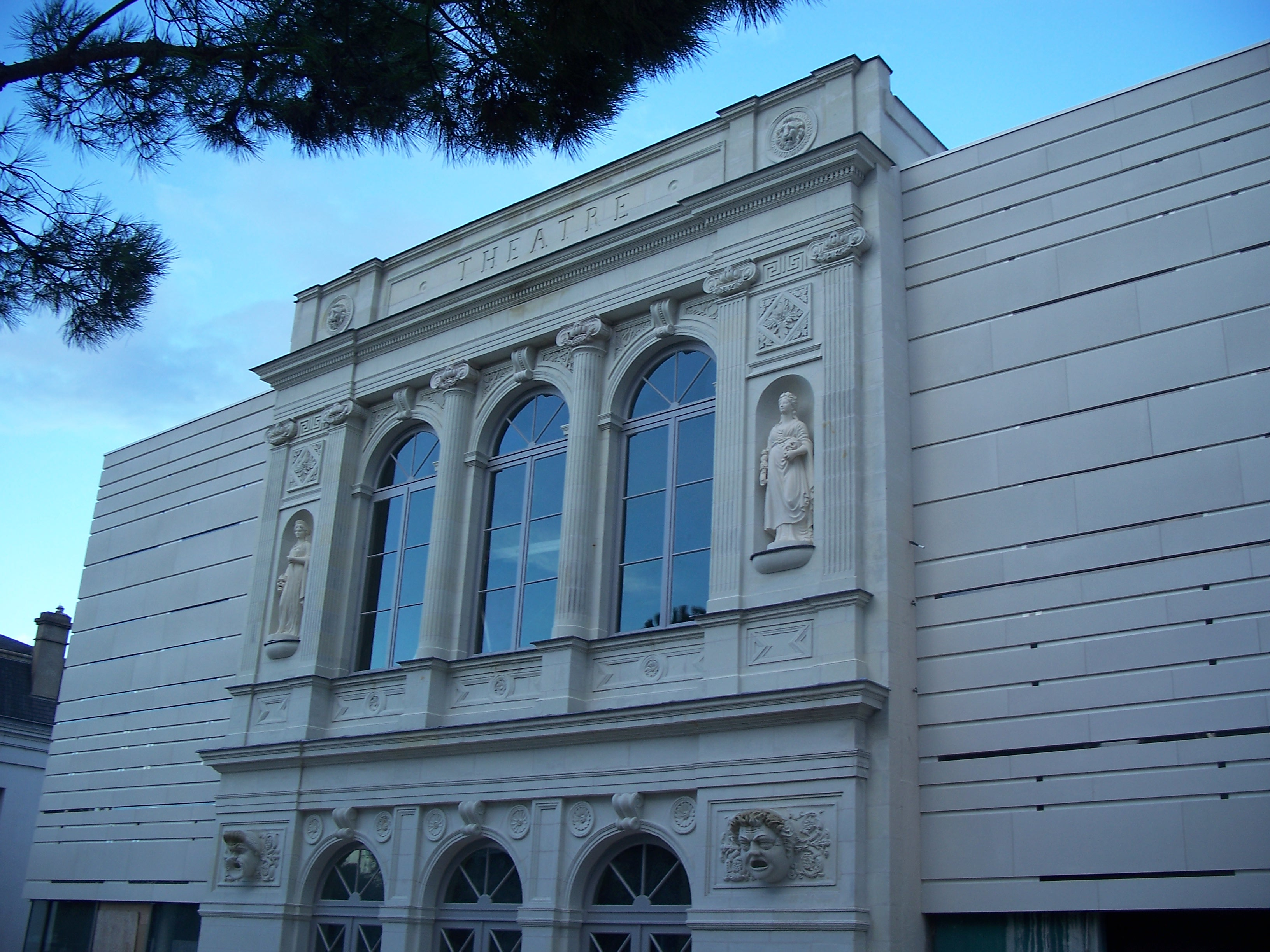 Théâtre municipal de Châtellerault (Classé) .